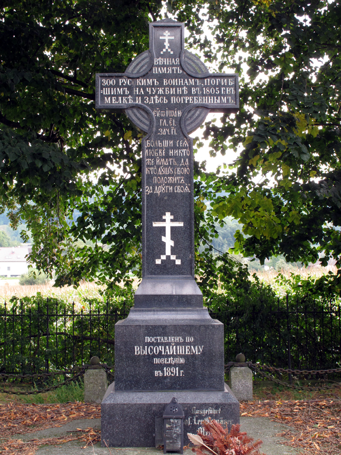 Denkmal für die zwei- bis dreihundert beim Brand im Stift Melk 1805 gestorbenen russischen Soldaten, errichtet 1891, renoviert und ausgebaut 1945-1955. An der B 1 zwischen Melk und Winden gelegen.